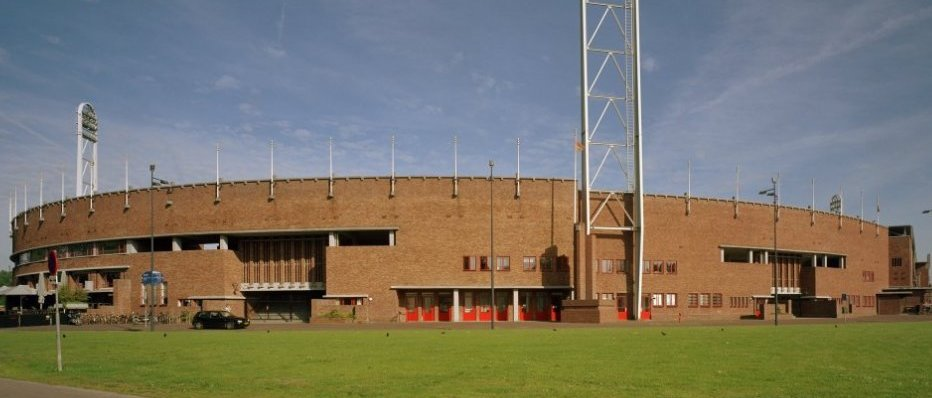 OLYMPISCH STADION: Overzicht Olympisch Stadion (opmerking: Gefotografeerd voor Monumenten In Nederland Noord-Holland)